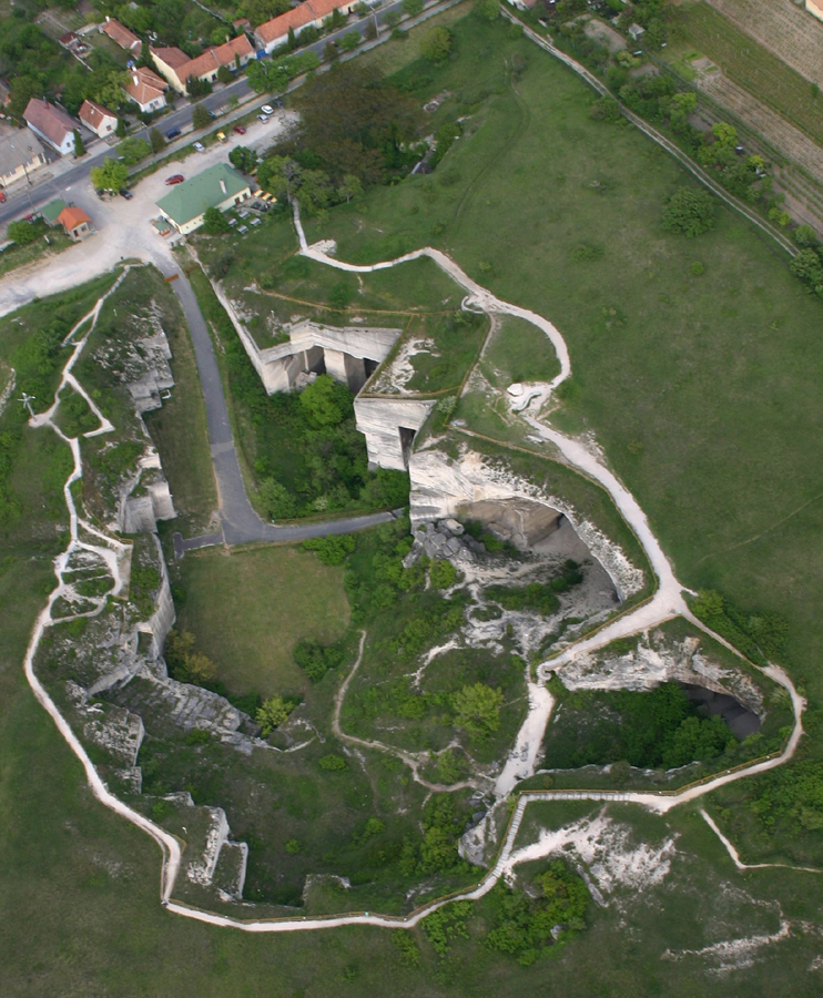 A fertőrákosi kőfejtő (Győr-Moson-Sopron megye)